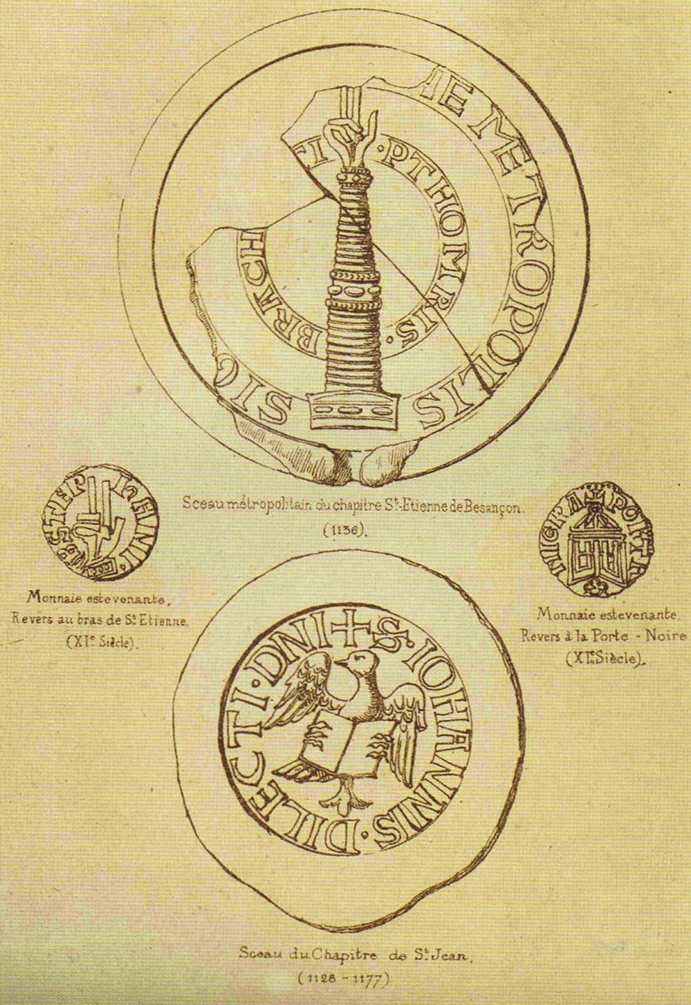 Sceaux des chapitres de Saint-Étienne et de Saint-Jean de Besançon (Doubs, France).